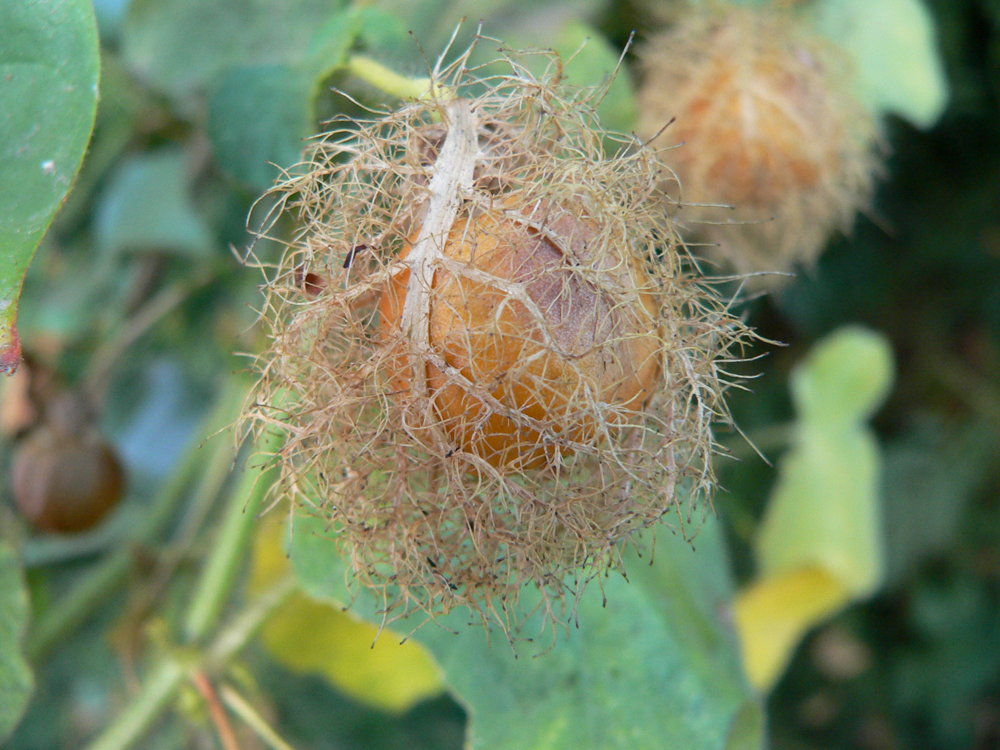 Passiflora foetida, La Réunion